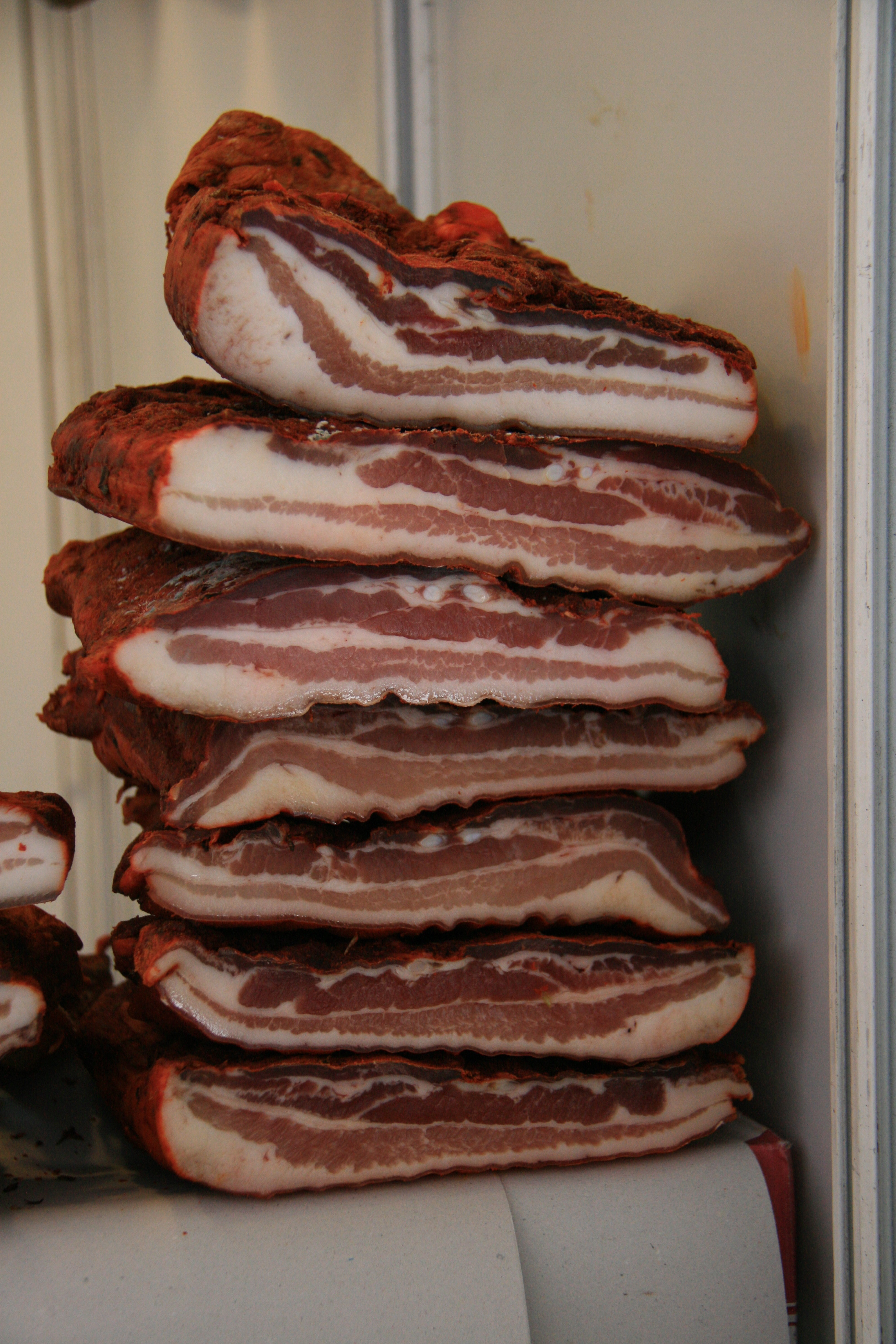 Pila de Bacón